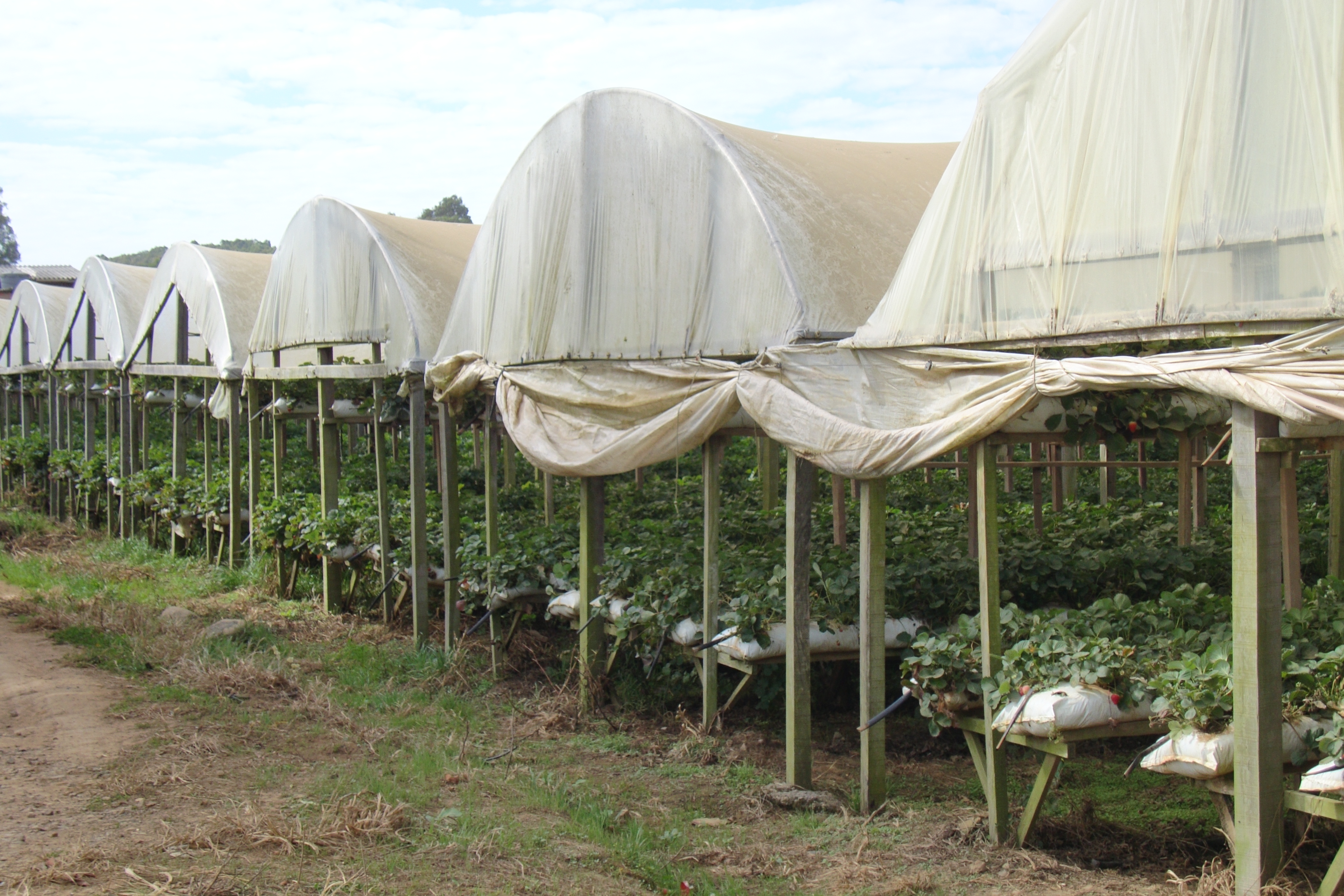 Cultivo morangos em hidroponia na Região da Serra do Rio Grande do Sul.